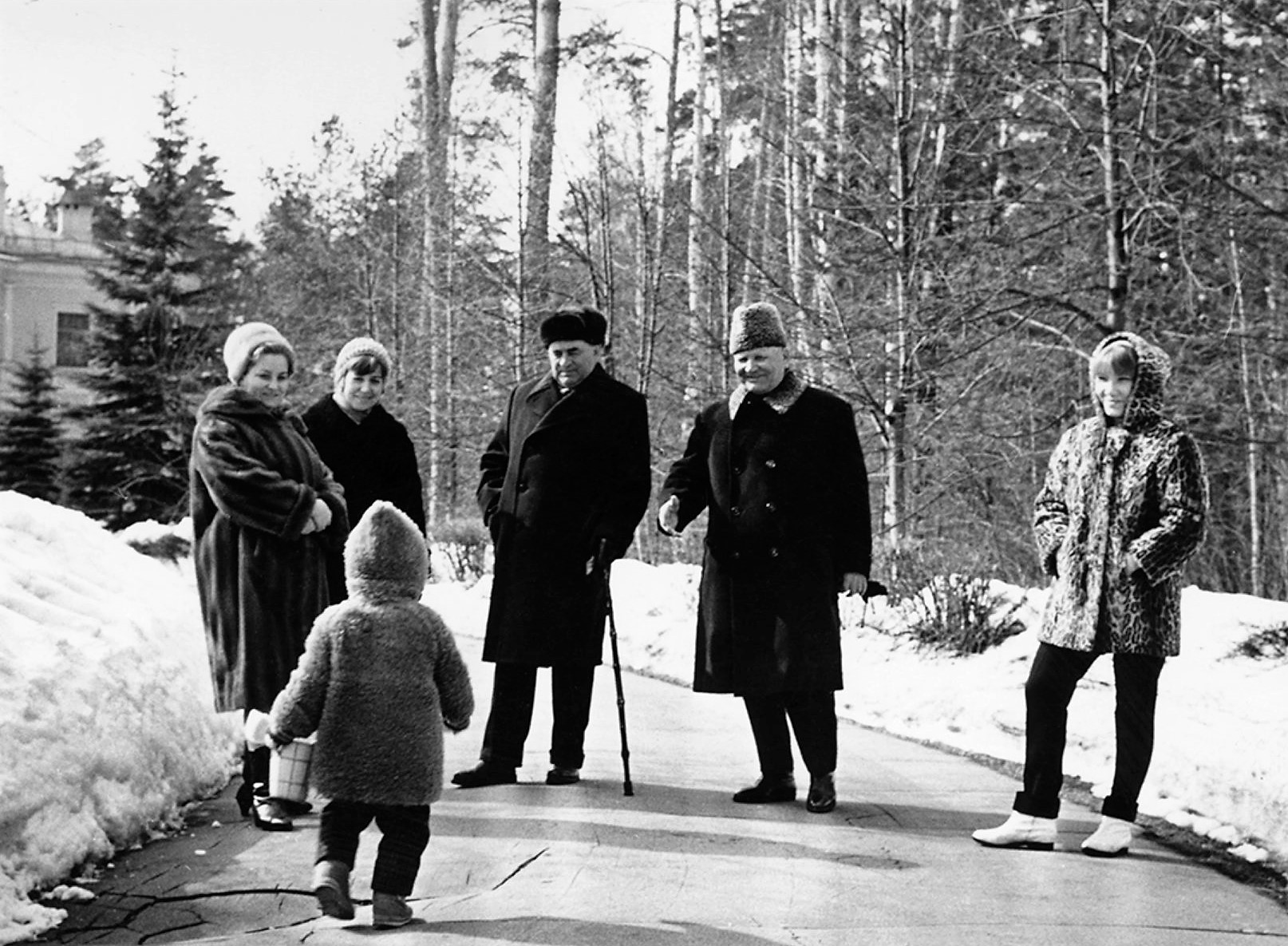 Иван Степанович Конев с семьёй на даче в Подмосковье. Крайняя слева стоит жена Конева Антонина Васильевна, крайняя справа - дочь Наталия. Спиной к камере находится, по всей видимости, внучка маршала Анна